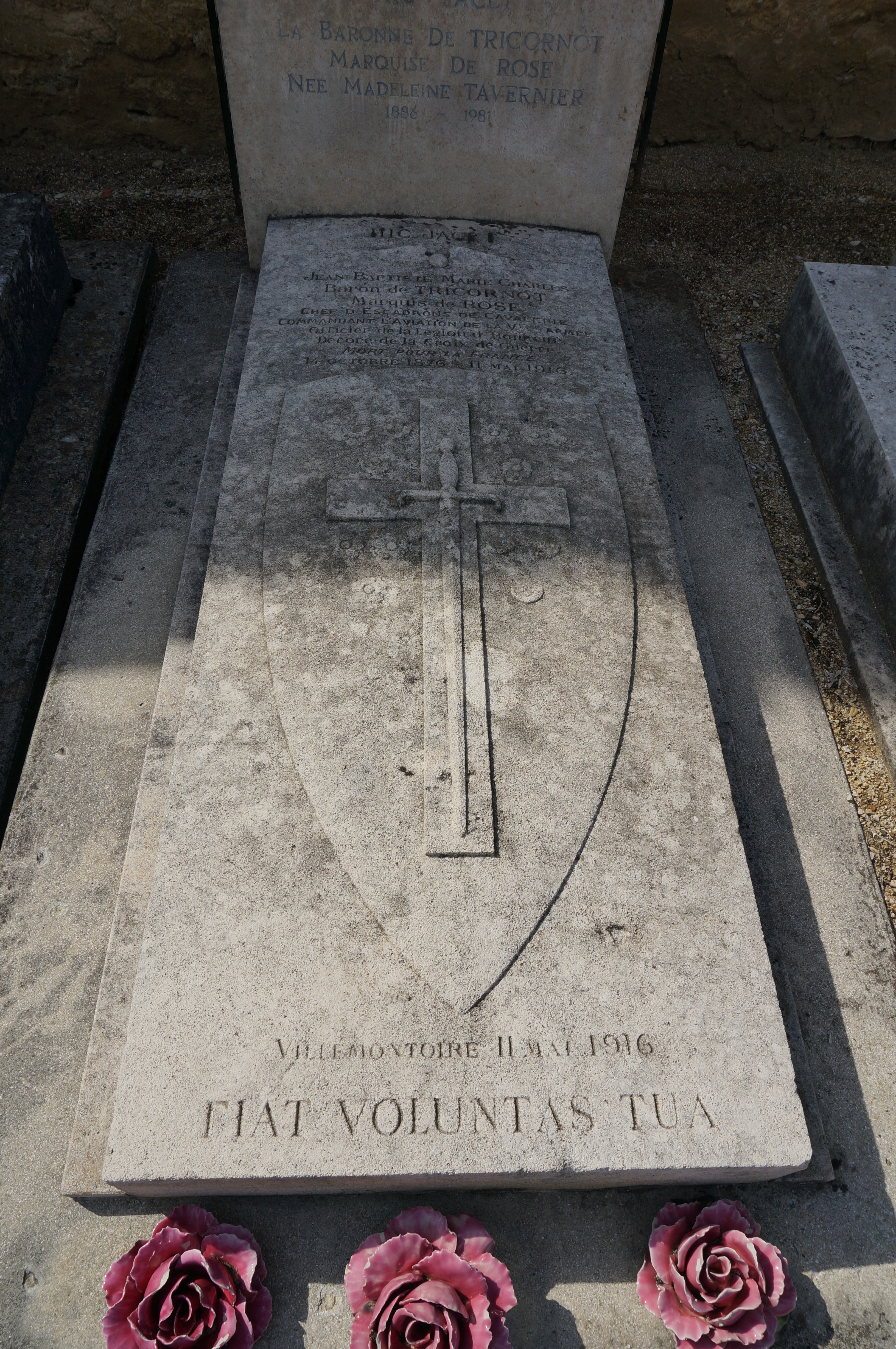 Jonchery-sur-Vesle.